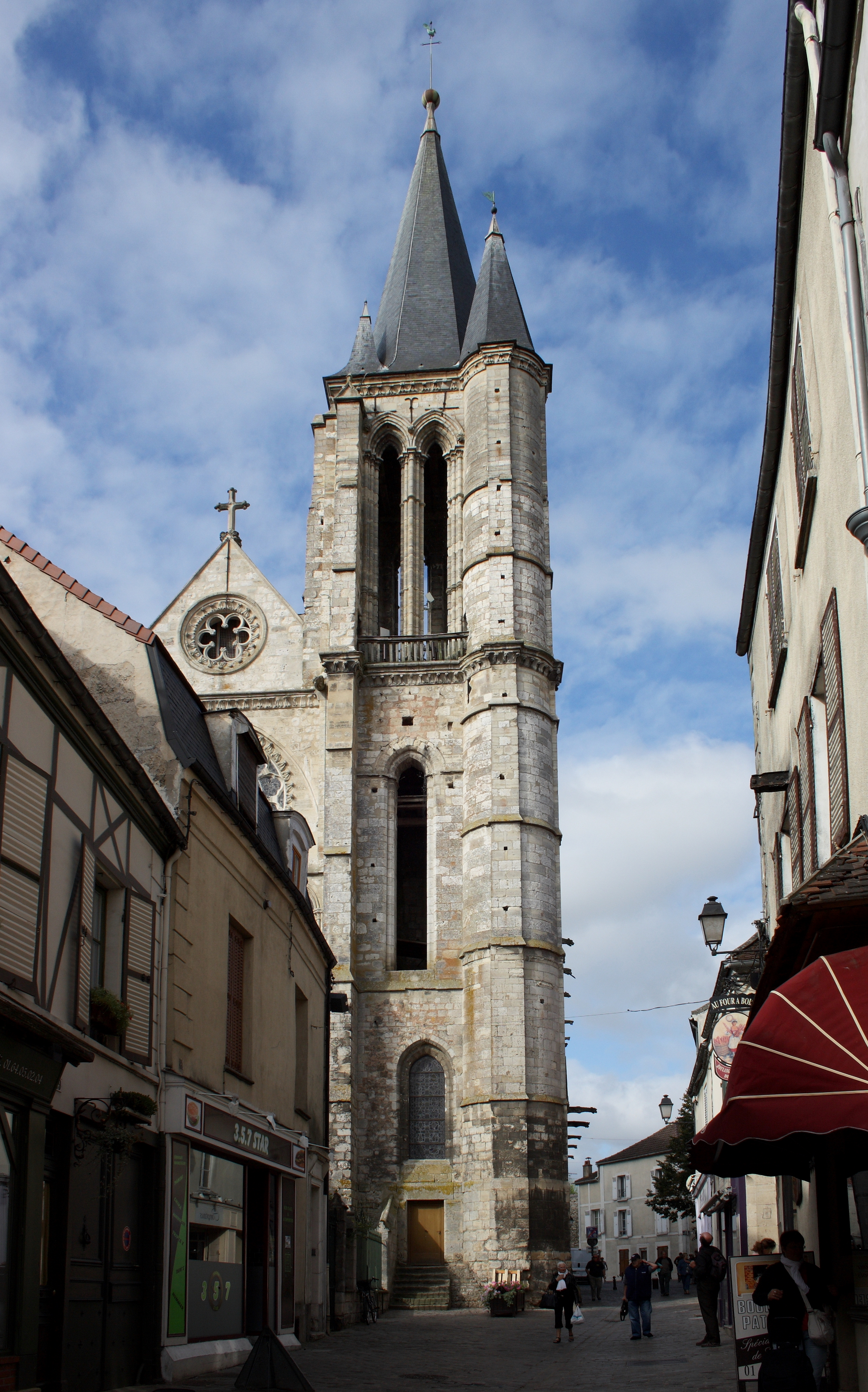 Katholische Pfarrkirche Saint-Étienne in Brie-Comte-Robert im Département Seine-et-Marne in der Region Île-de-France (Frankreich), Glockenturm Object location48° 41′ 25.08″ N, 2° 36′ 30.6″ E